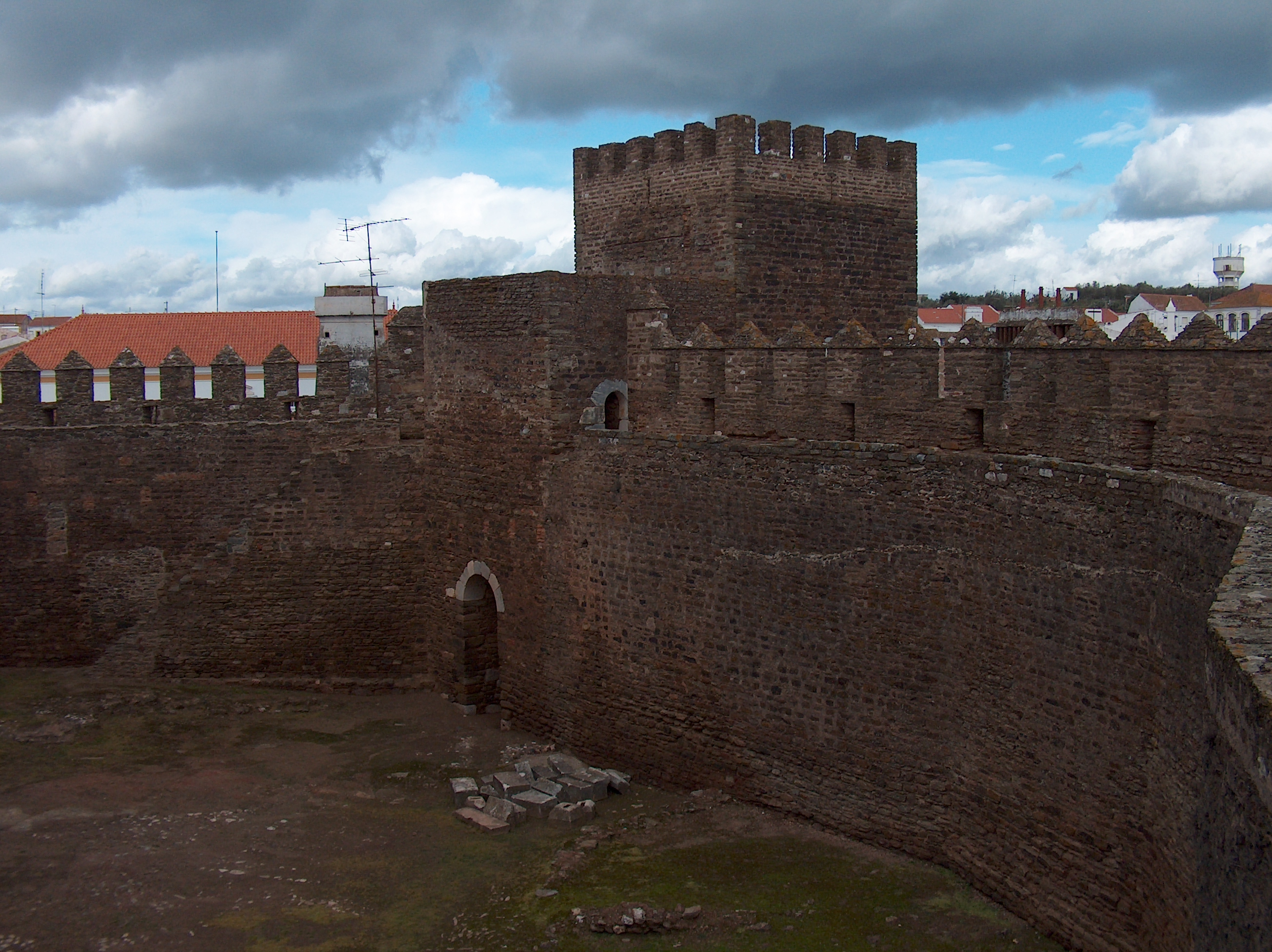 Castelo do Alandroal